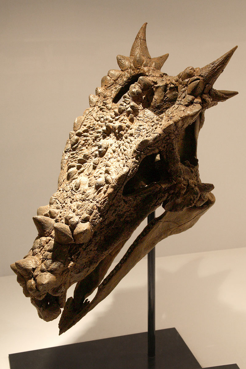 Dracorex - 01